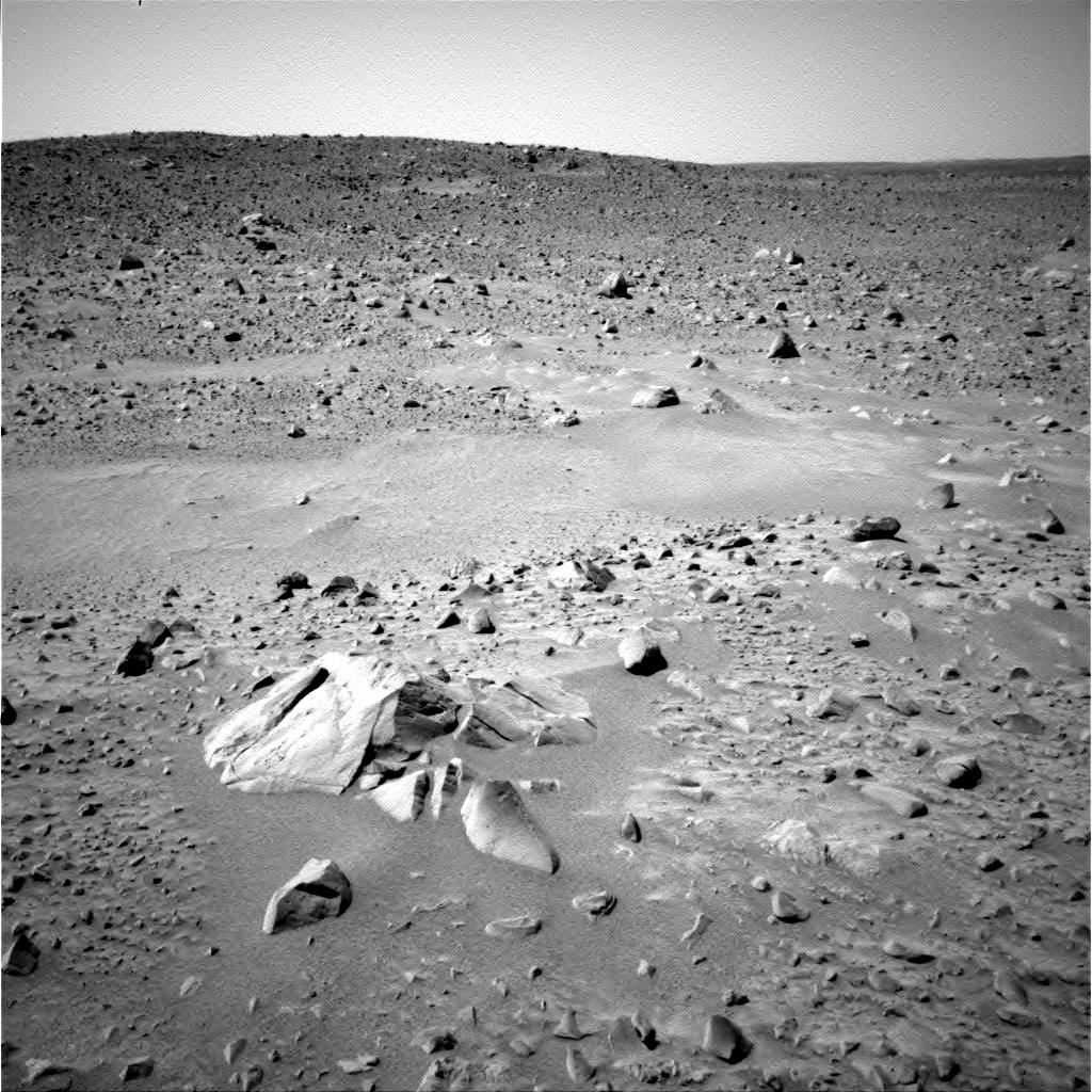 Vue de Mars depuis le robot Spirit le jour Sol 30 de sa mission.